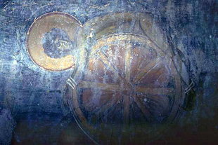 Ο Άγιος Γεώργιος εν τροχώ δεθείς και οργάνω σιδηρώ όξεσι κατακοπείς